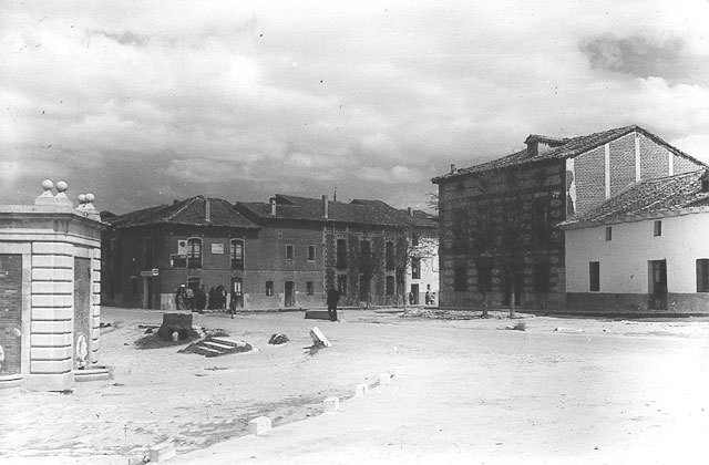 Plaza - Mojados (Valladolid) - Tarjeta. Papel brillo 140 x 90 B/N